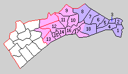 千葉県海上郡の町村。